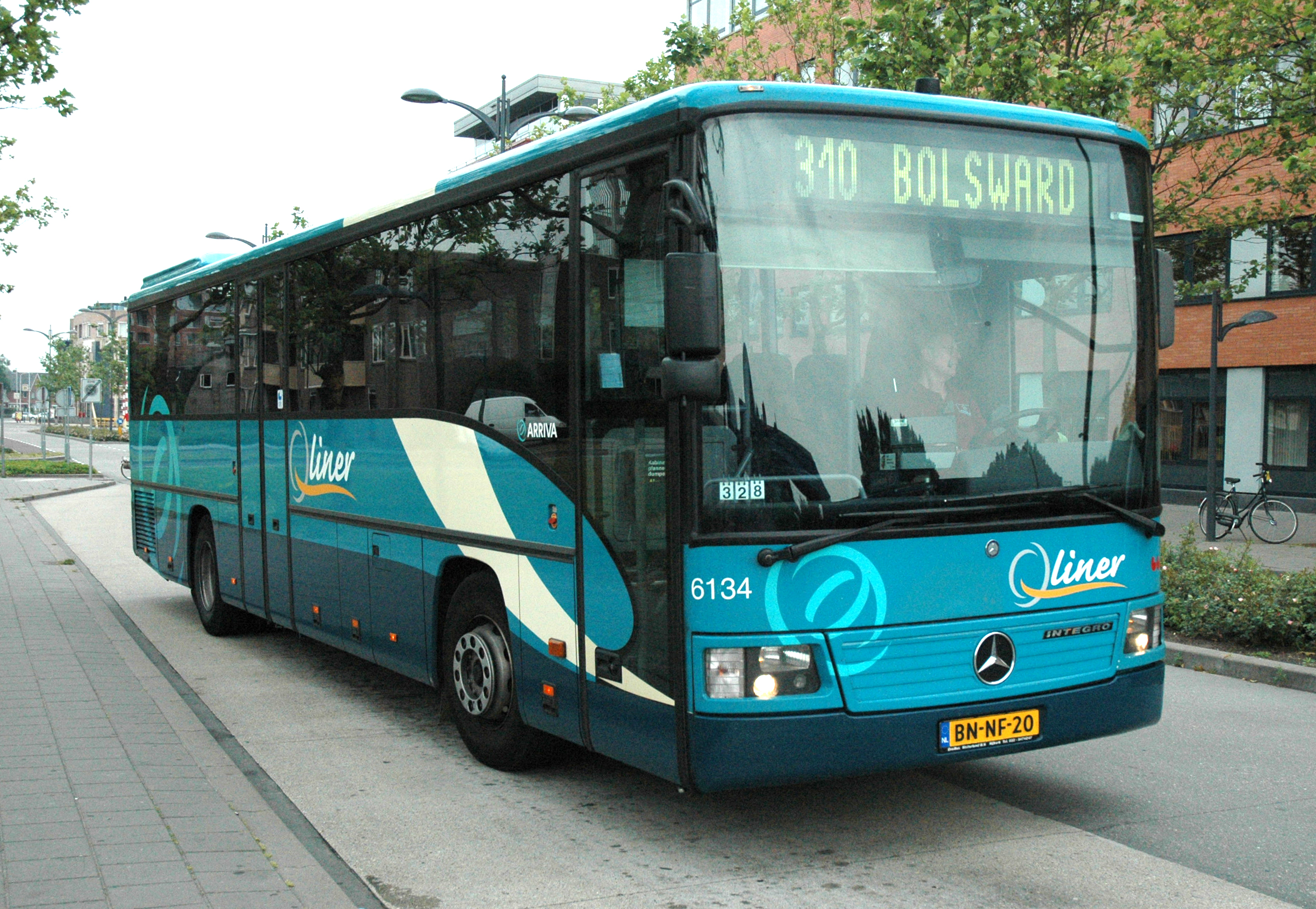 Arriva bus 6134 van het type Mercedes-Benz Integro als Qliner 310 naar Bolsward te Station Heerenveen.